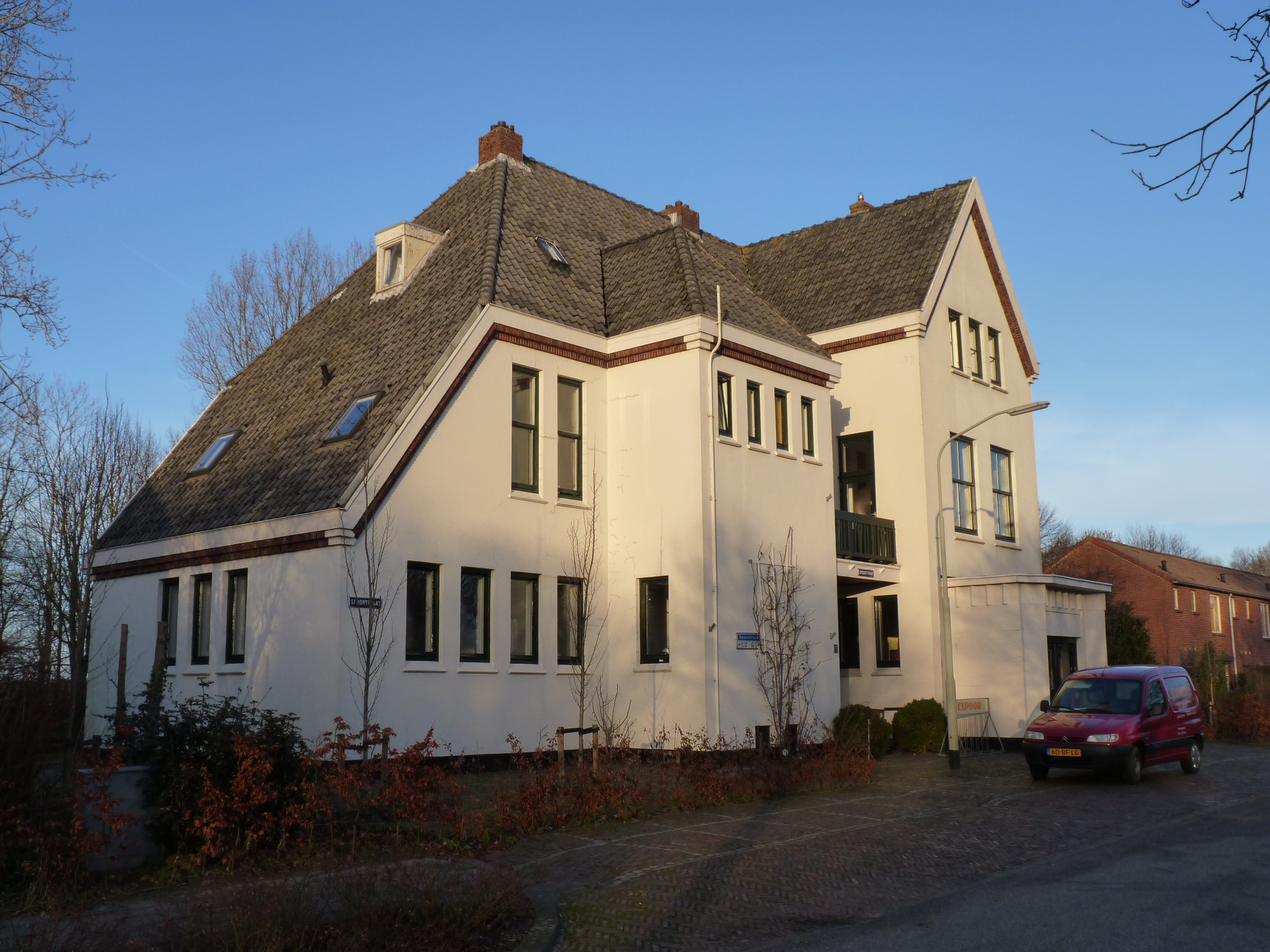 Ulrum Stationsgebouw Spoorstraat 28